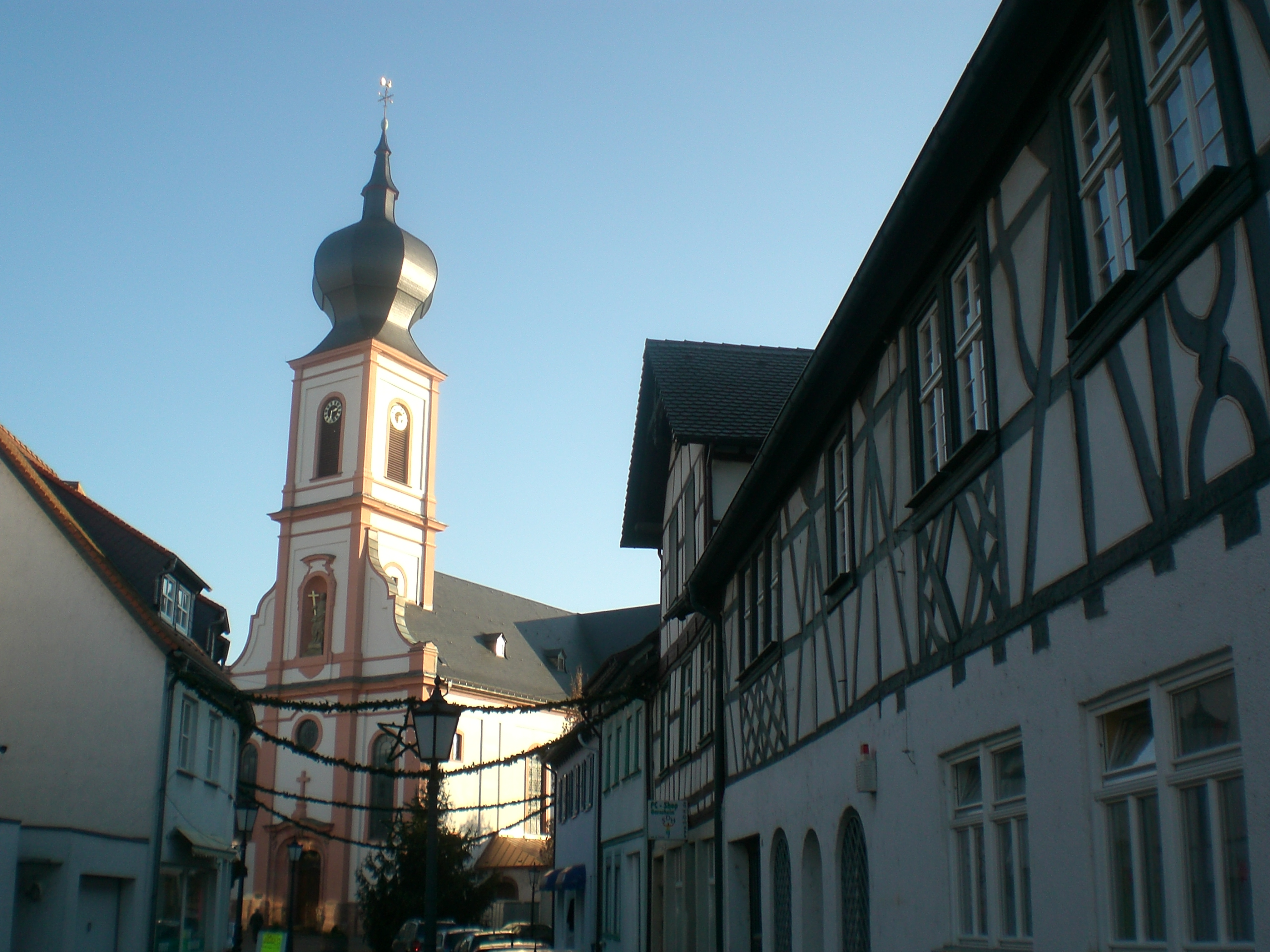 kirko de Maria Magdalena en Gernsheim, Hesio